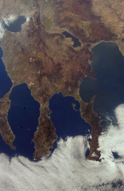 Península de Calcídica en Macedonia, con sus tres penínsulas: Casandra (antigua Palene), Sitonia y Acté (del Monte Athos). Entre las de Palene y Sitonia se abre el golfo de Torone. El Golfo Singítico separa la península de Sitonia de la de Acté, y en cuyo interior se encuentra la isla de Ammoulianí. Al oeste de Palene se halla el golfo Termaico (o de Tesalónica), en el que desaguan, de izquierda a derecha, los ríos Haliacmón, Vardar y Equidoro. Al este de Acté se abre el golfo Estrimónico (parte del Mar de Tracia). Al noroeste de la Calcídica se encuentra el lago Volvi (antiguo Bolbe).